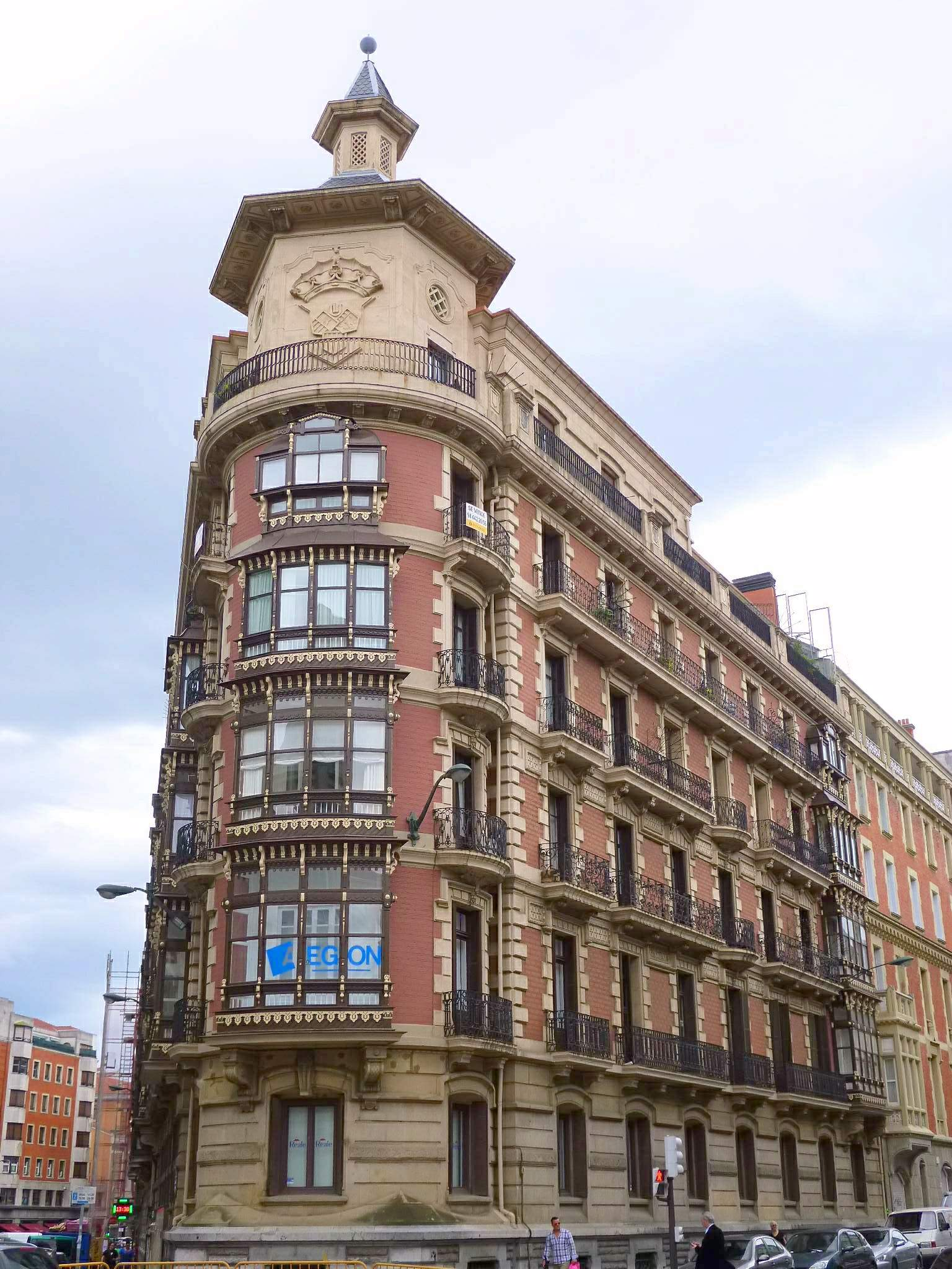 Edificio en la calle Cardenal Gardoki, 10, esquina con calle Astarloa (Bilbao)